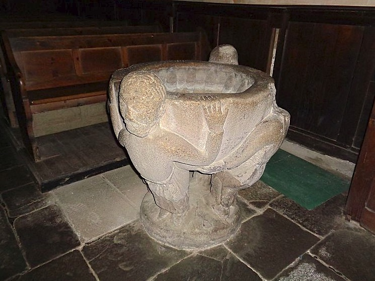 Cuve baptismale du XIIe siècle en granite, classée monument historique le 1911/05/01 à titre d'objet, référence Palissy : PM22000131